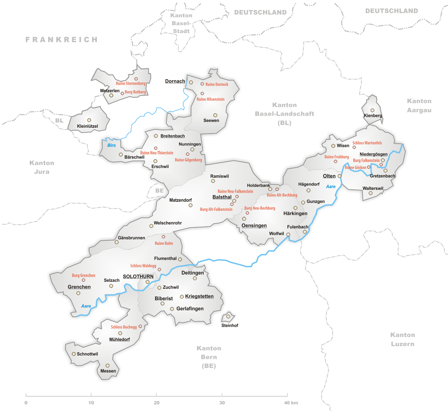 Karte der Burgen und Schlösser des Kanton Solotthurn.